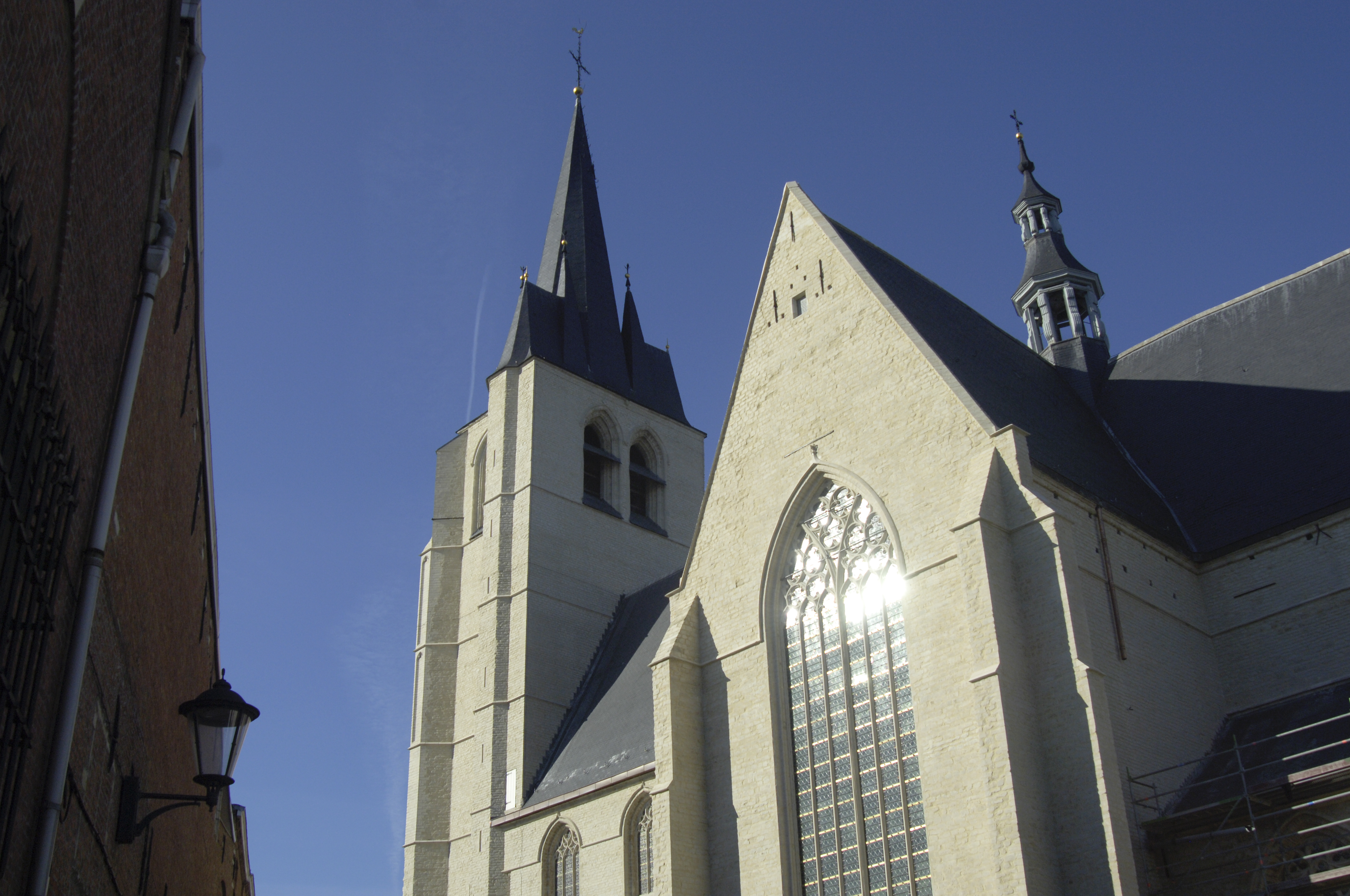 Sint-Janskerk